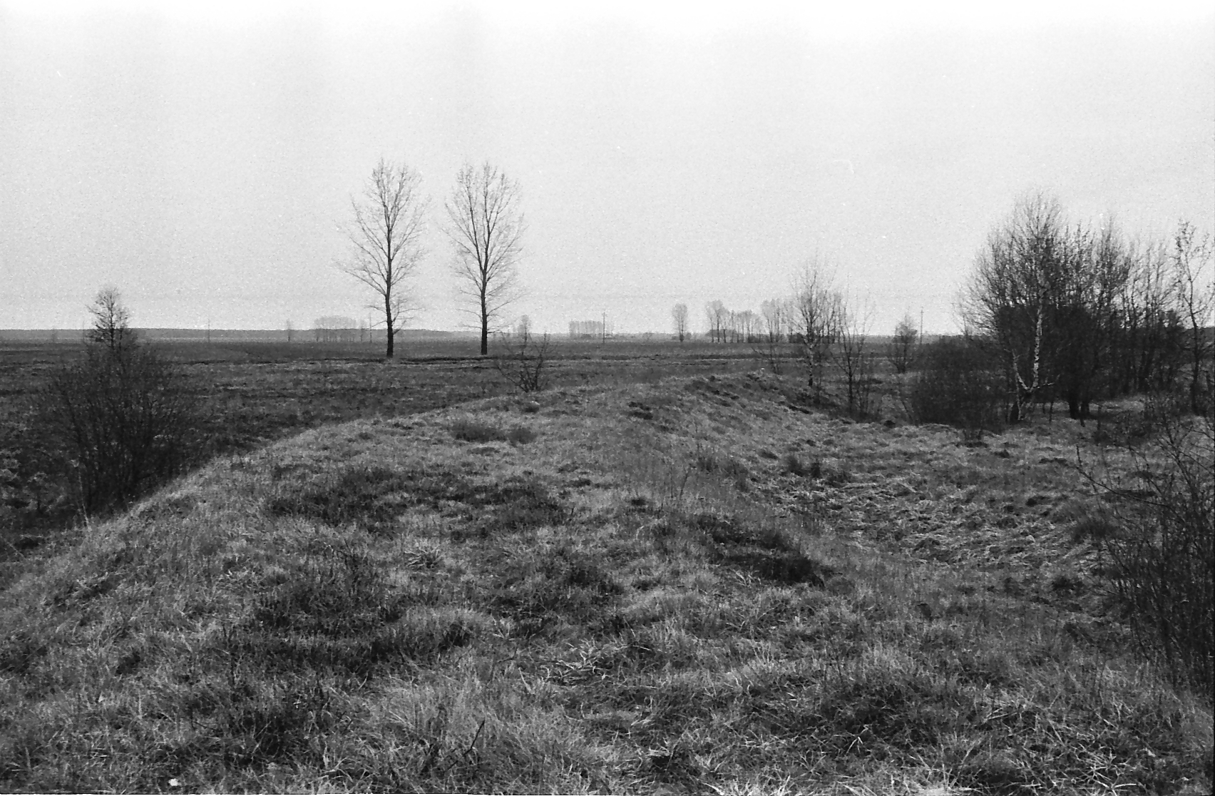 Zewnętrzne wały grodziska w roku 1993 (przed zniszczeniem).